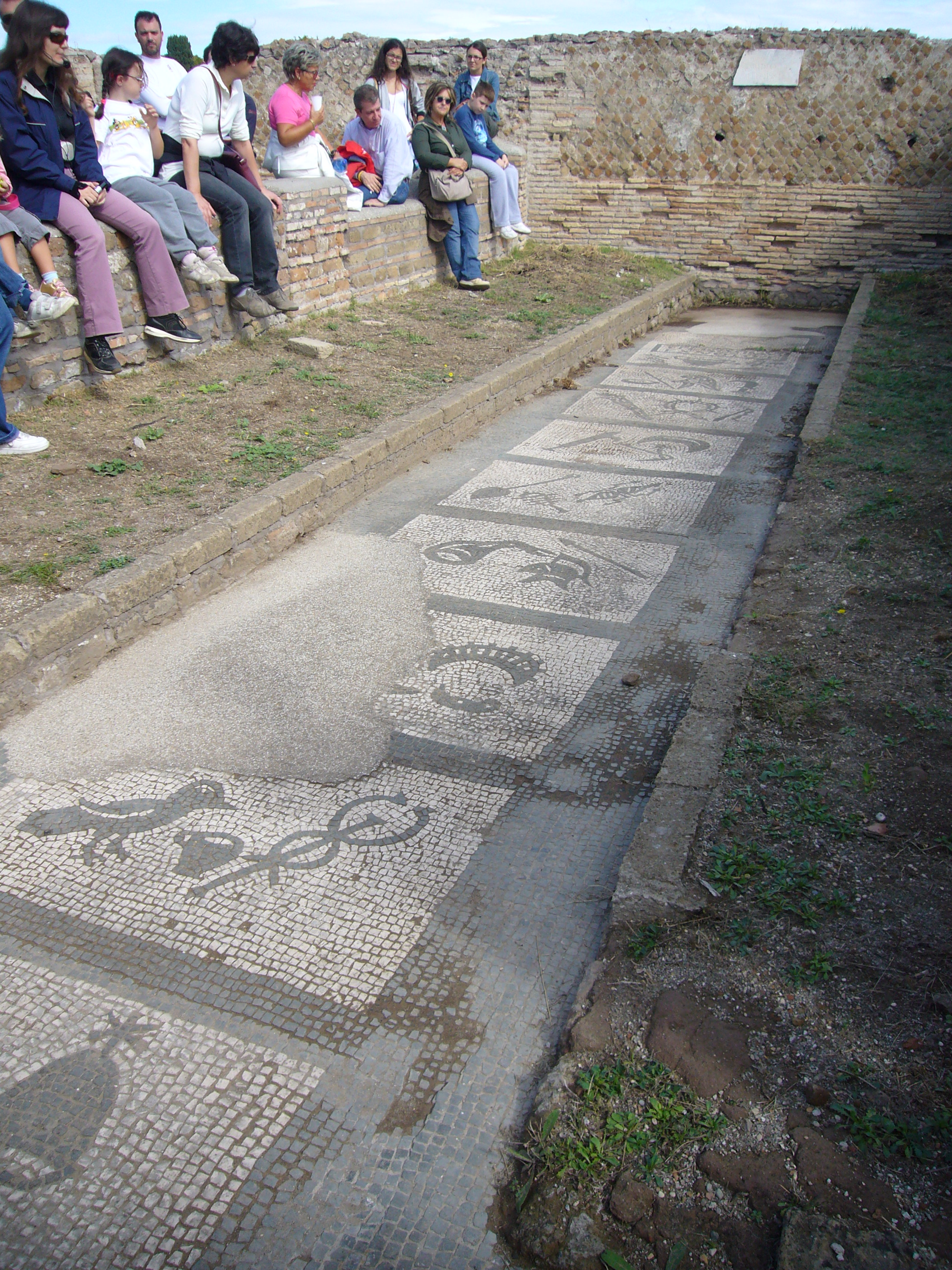 Ostia antica, mitreo di Felicissimo